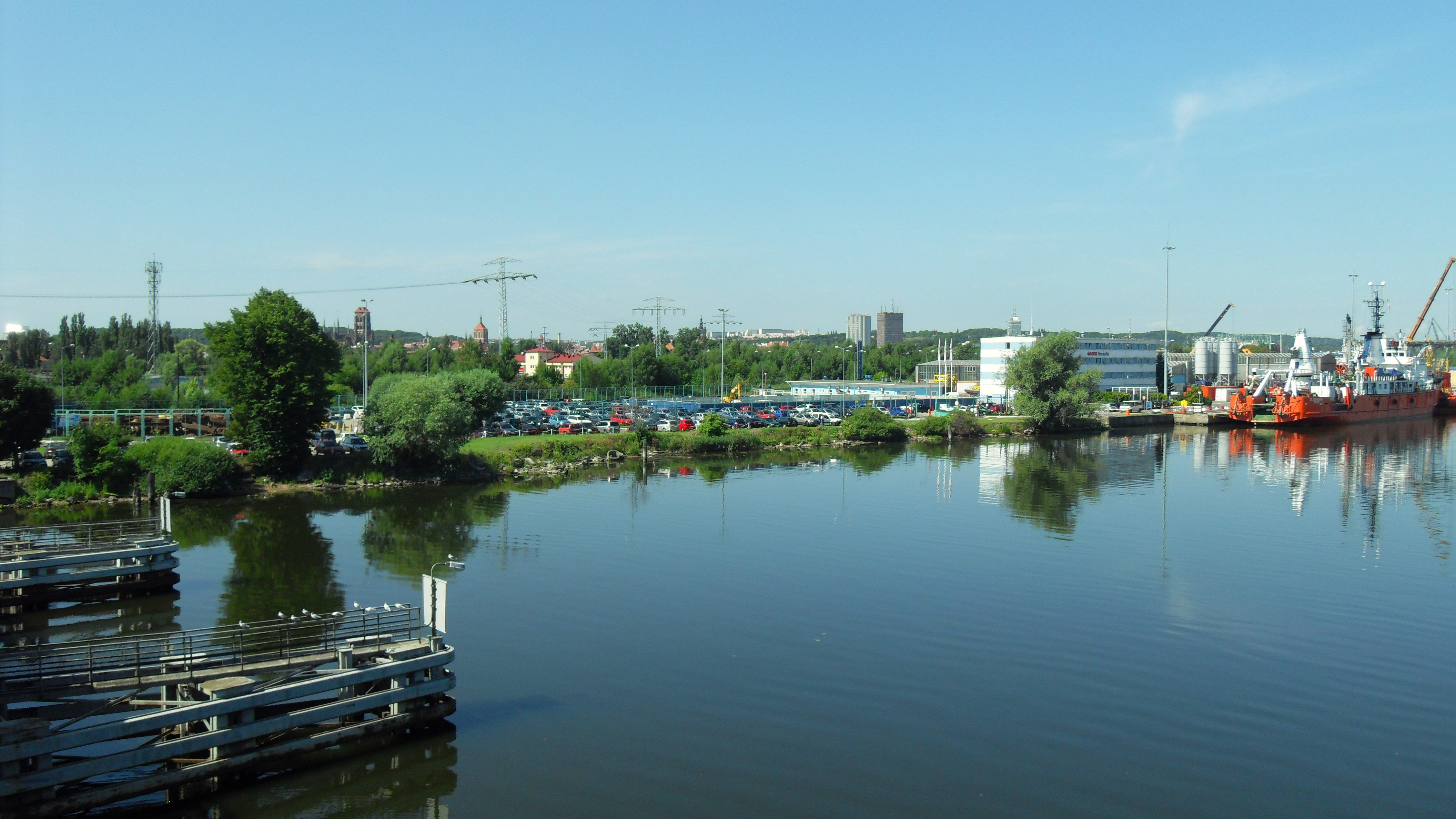 Gdańsk Sienna Grobla (budynki przy ul. Stary Dwór) i Martwa Wisła.